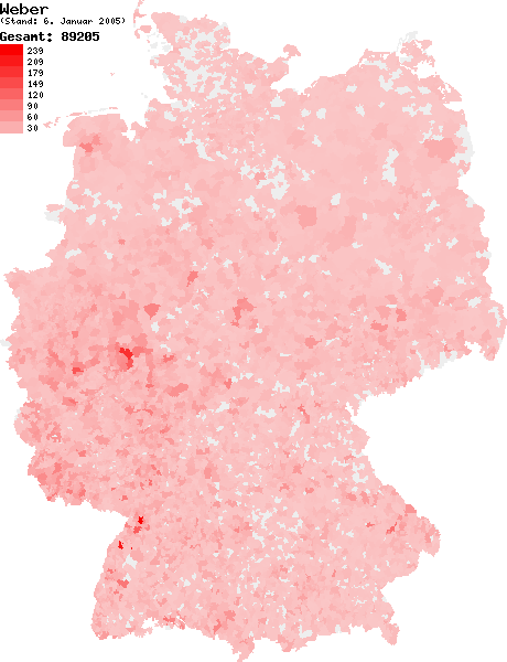 Verteilung des Nachnamens Weber in Deutschland nach dem Telefonbuch mit Stand vom 6. Januar 2005 Source: selbst erstellt Ersteller: W. Baumgartner